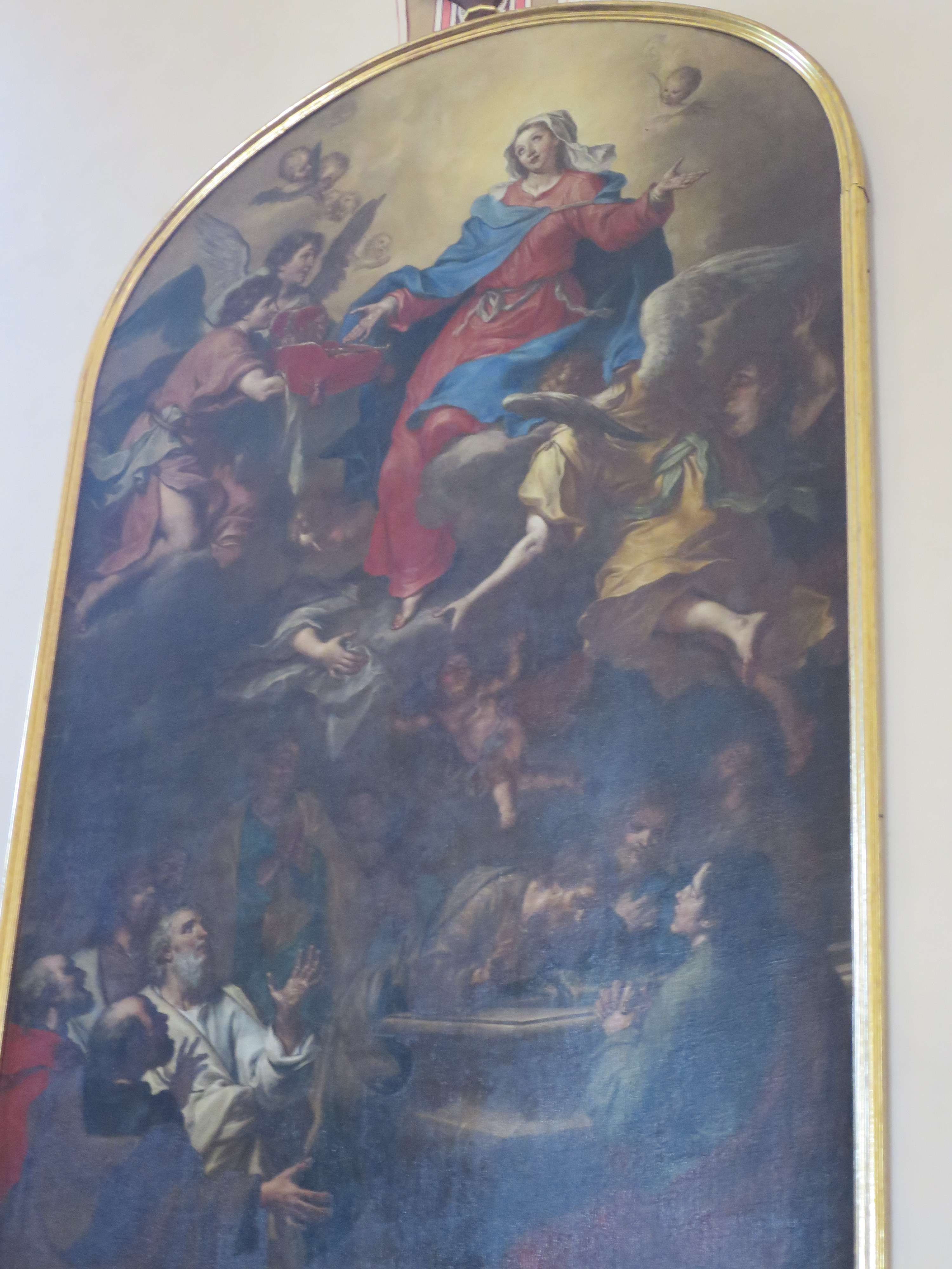 Hochaltarbild des Vorgängerbaus im Langhaus von B. Litterini 1731, Maria Himmelfahrt.